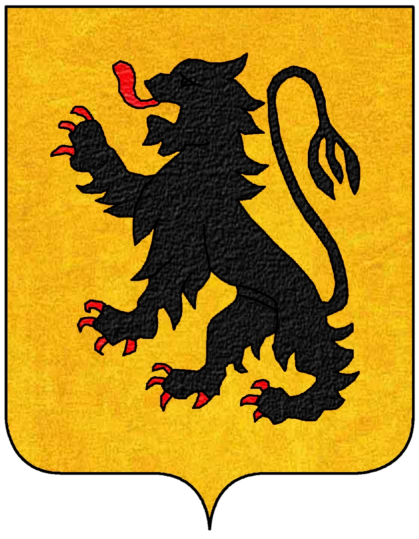 Stemma della famiglia Balbi di Venezia